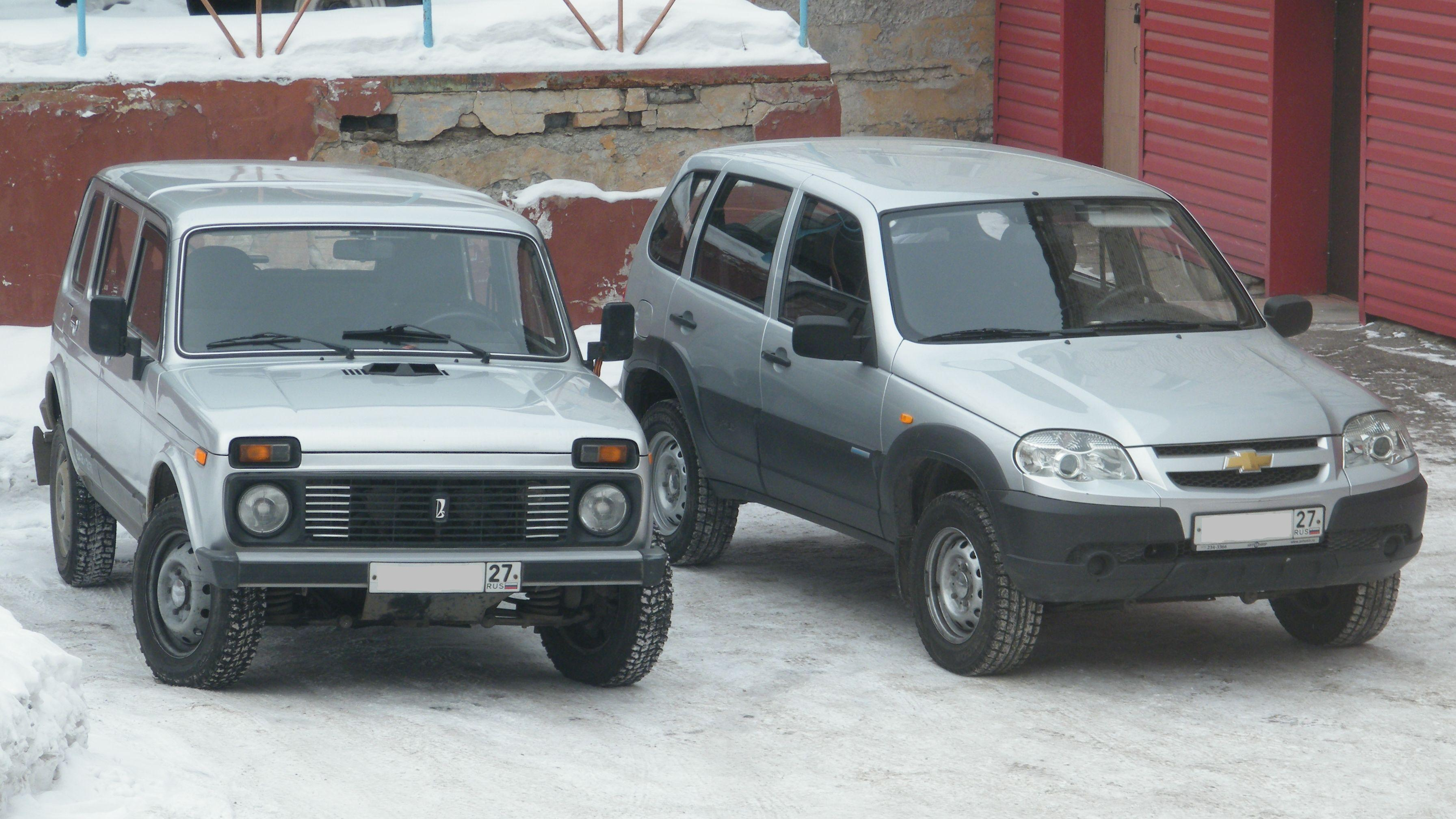 ВАЗ-2131 и Шевроле-Нива